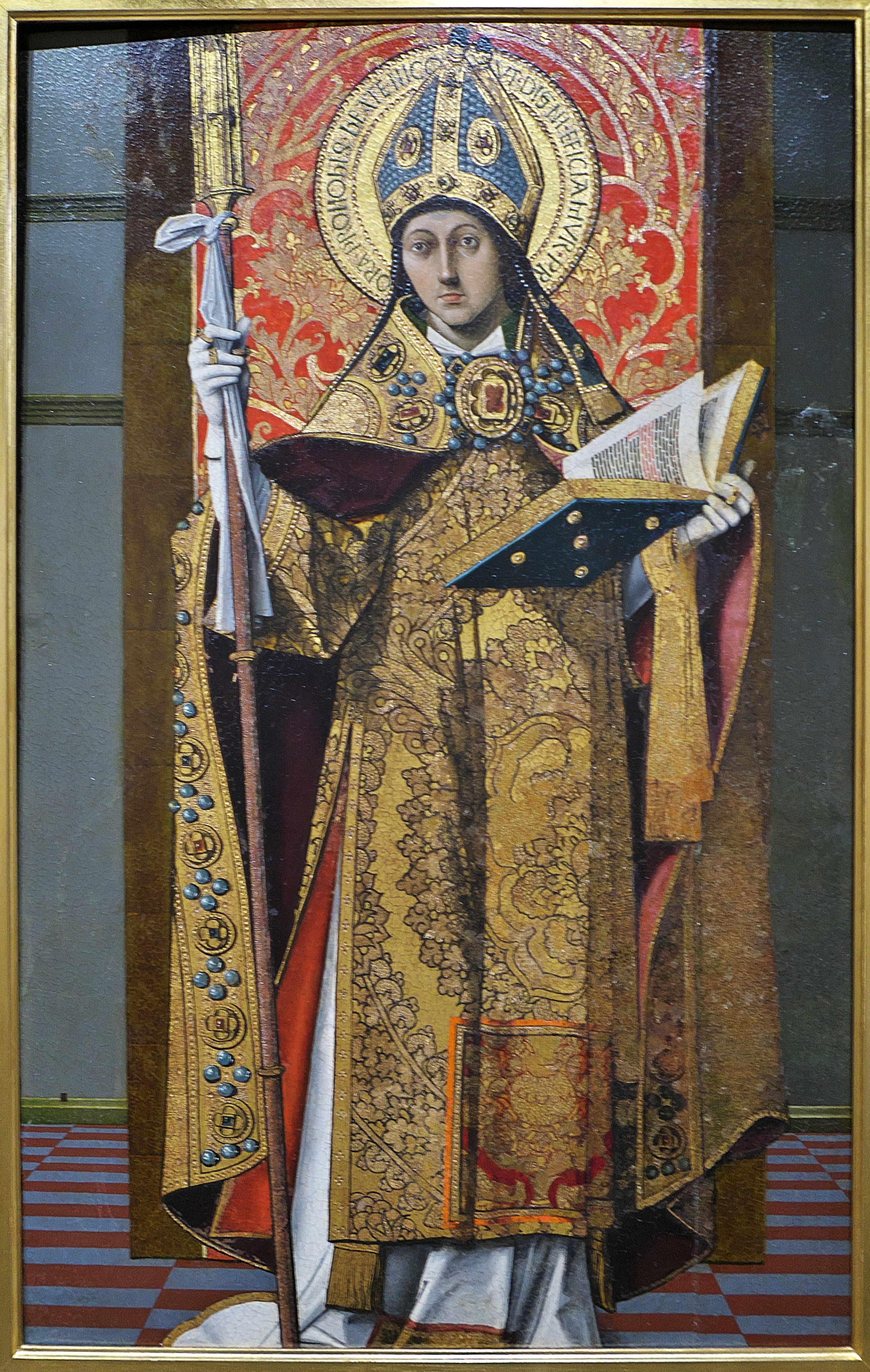 Museo de Bellas Artes de Córdoba. Pedro de Córdoba pinta al óleo sobre tabla, segunda mitad del XV, a San Nicolás de Bari para la Iglesia de San Nicolás de la Villa (Córdoba).